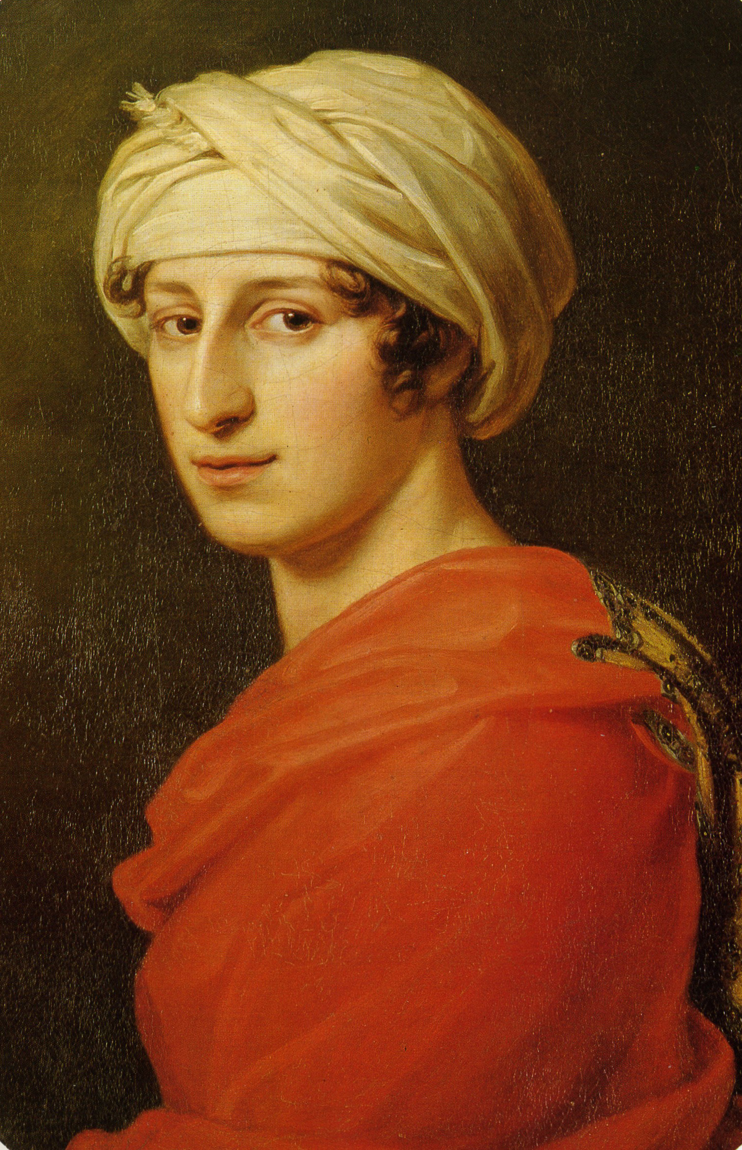 Gemälde